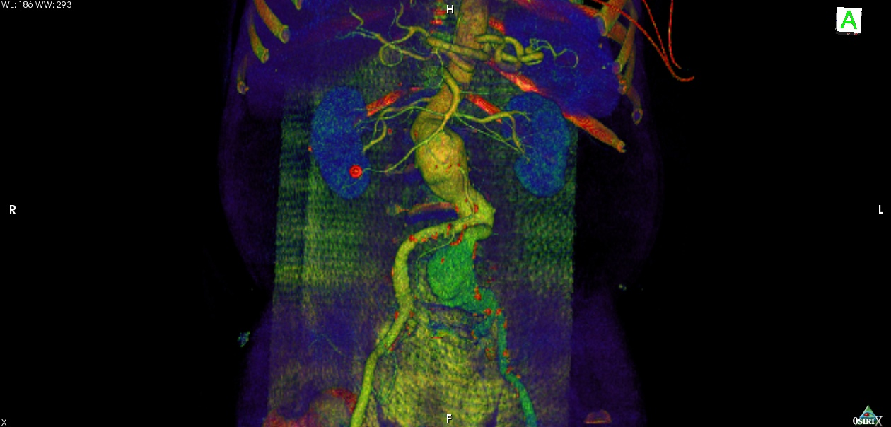 Angioscanner d'un patient présentant un anévrysme de l'aorte sous rénale. Notez également le volumineux anévrysme de l'artère iliaque primitive gauche de couleur vert pale